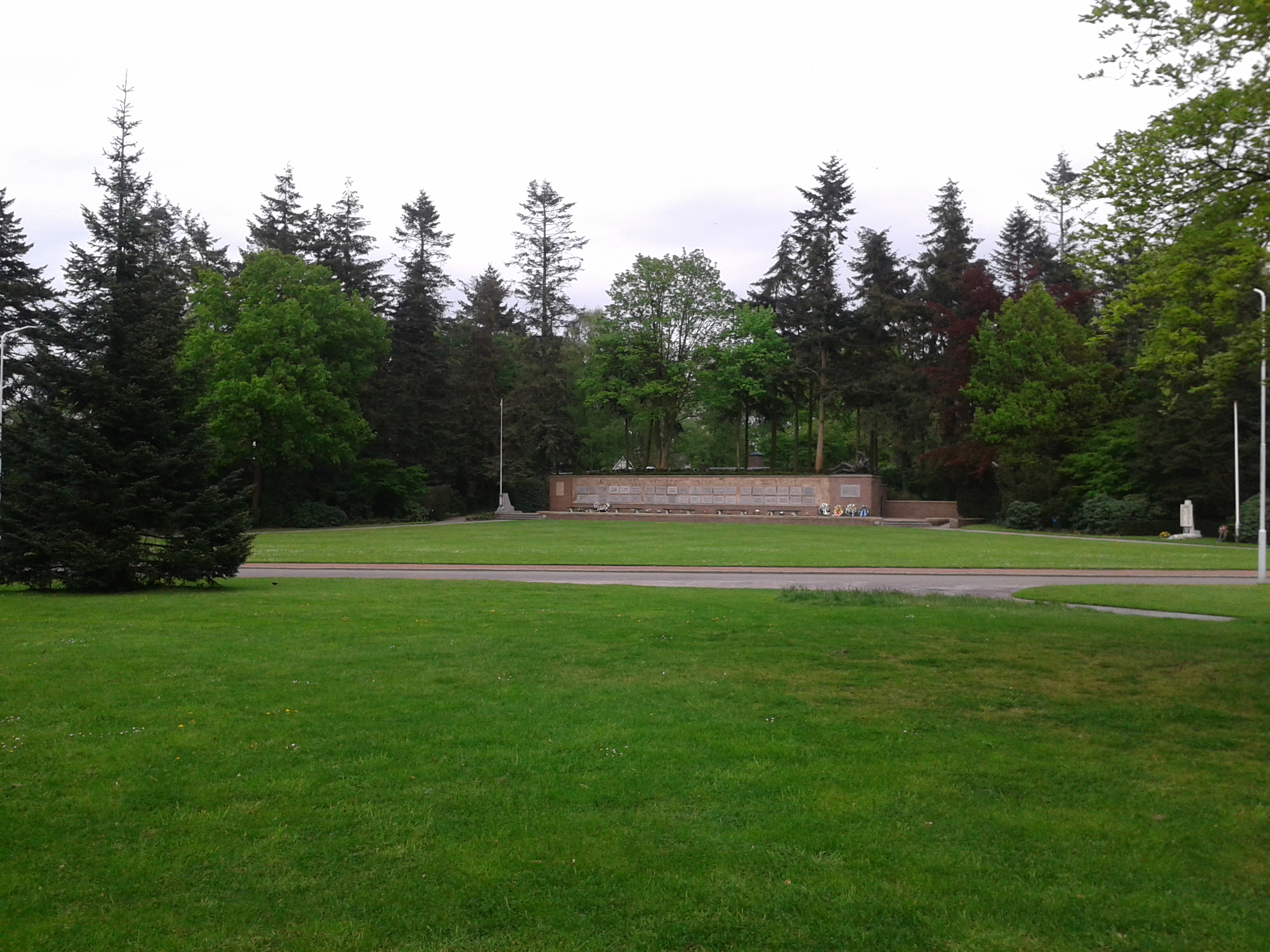 Mausoleum in Ede totaalbeeld